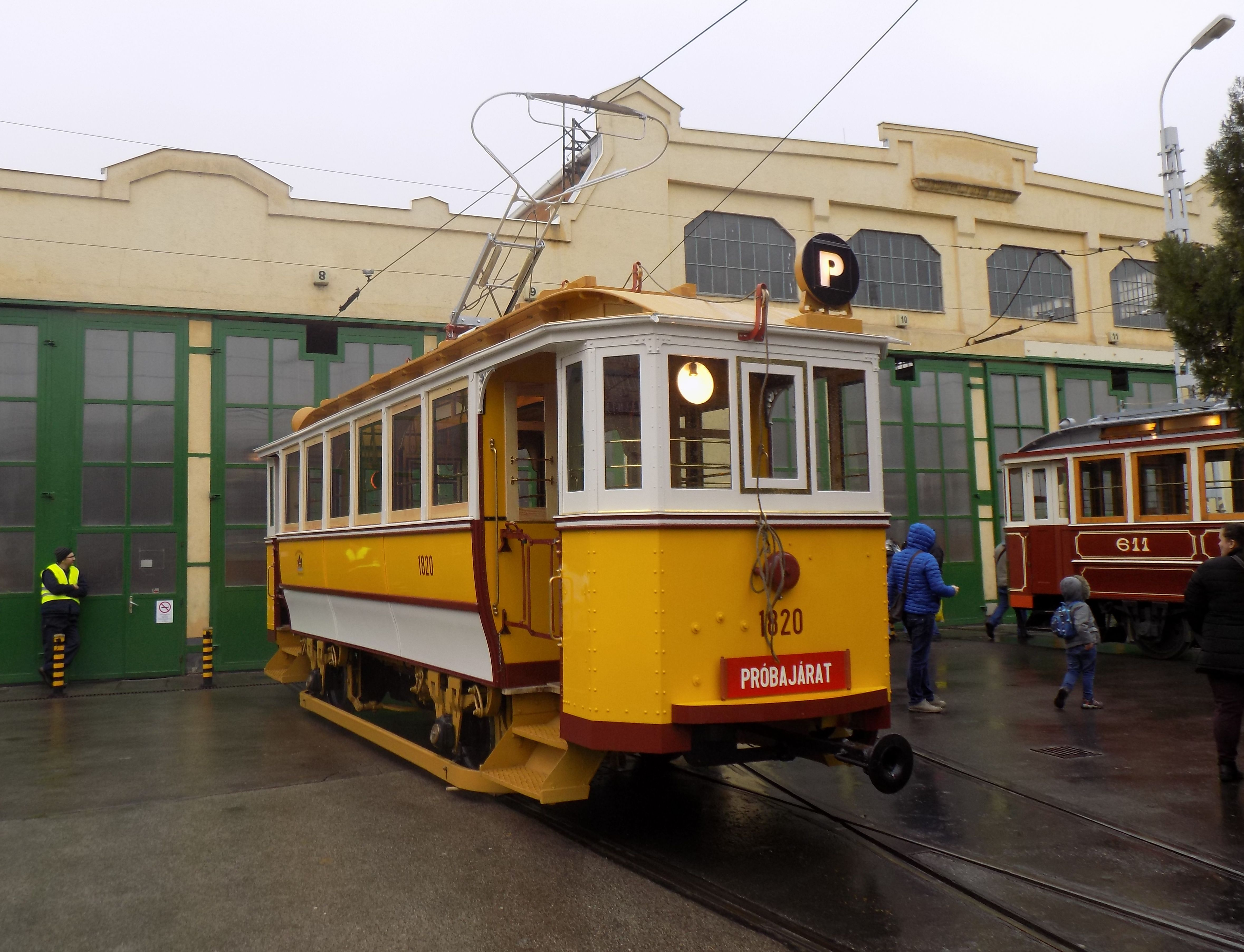 S típusú nosztalgiavillamos a Kelenföld kocsiszínben (psz. 1820)